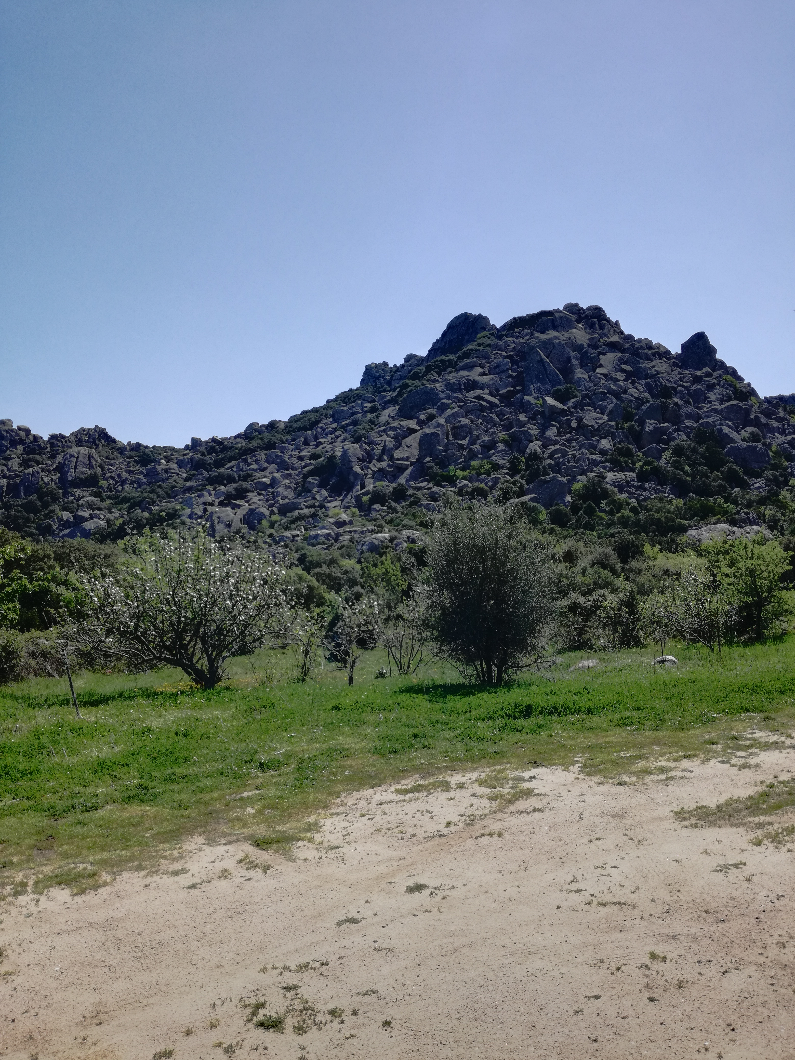 Il monte "Monti Brusjatu", nell'omonima località dell'agro di Calangianus.